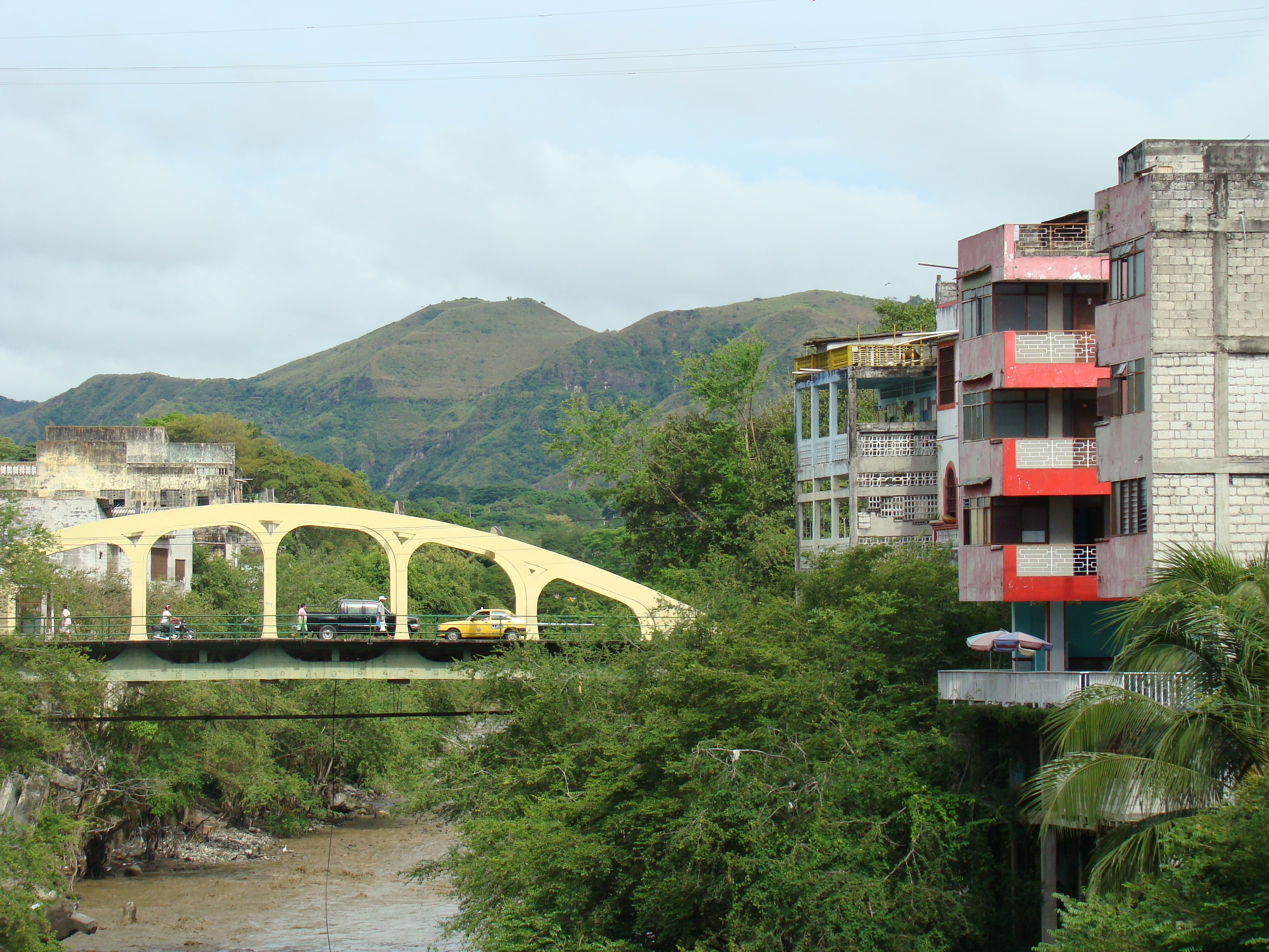 Puente